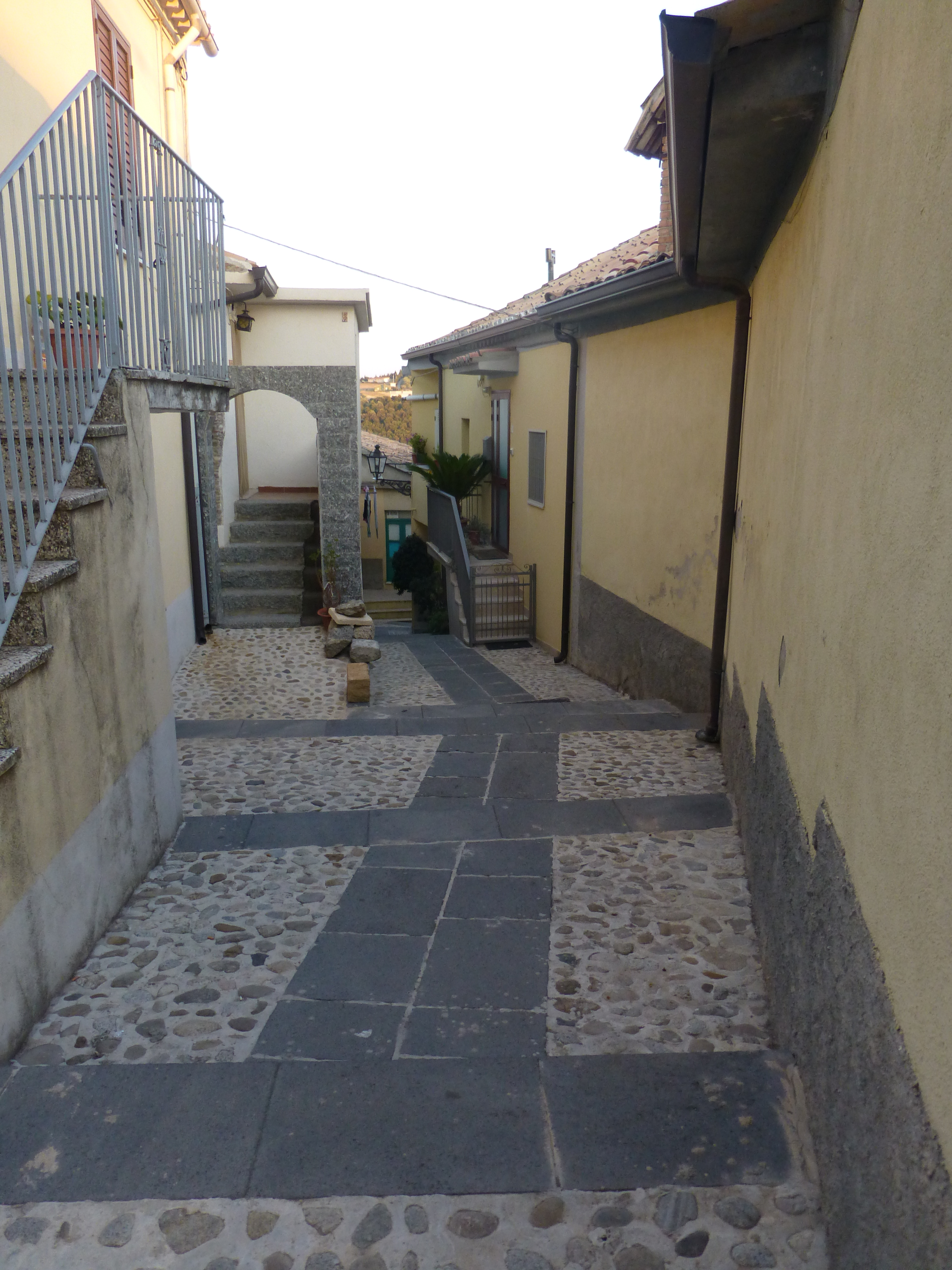 Via di squillace